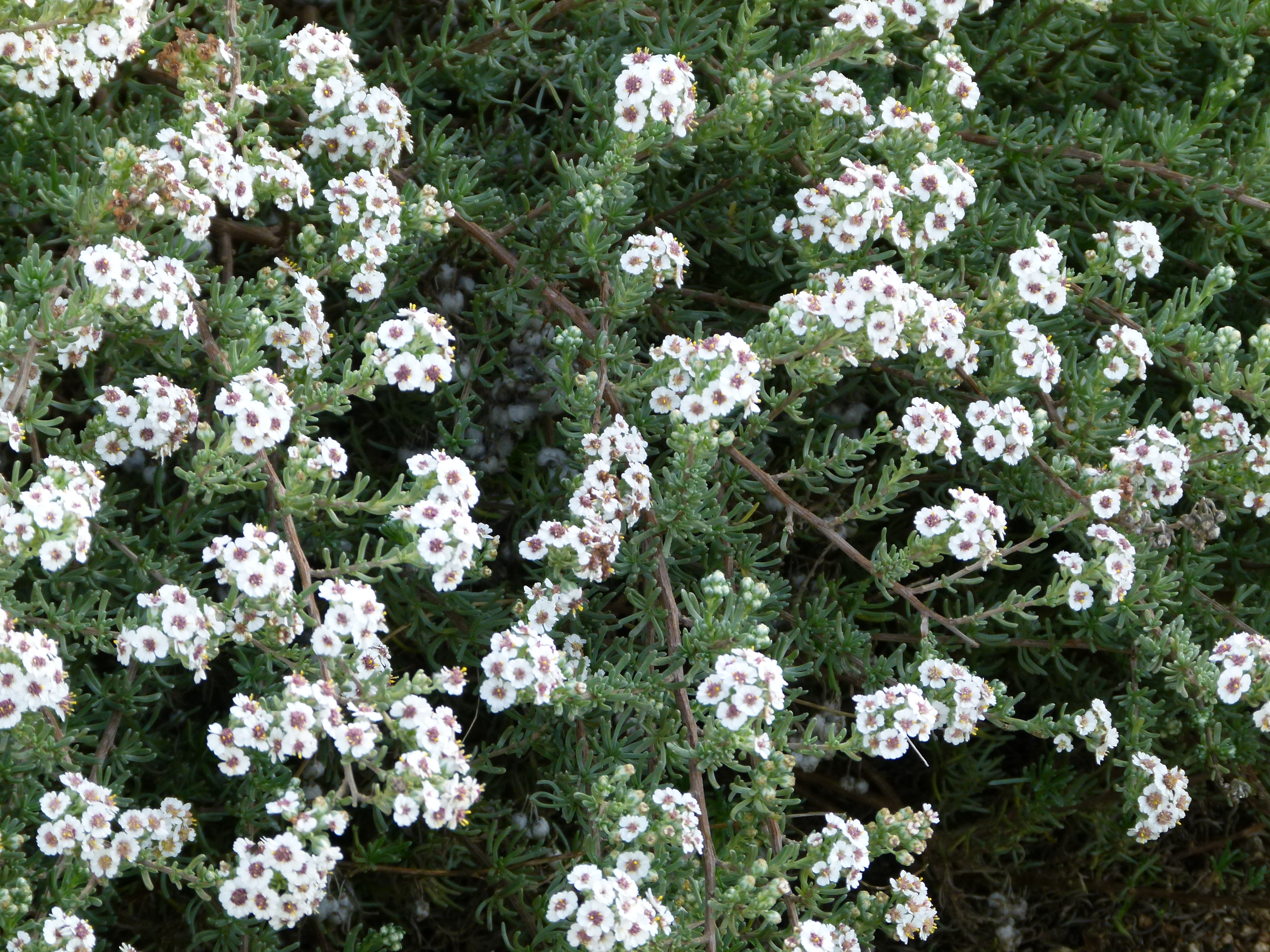 Jardin botanique Barcelone